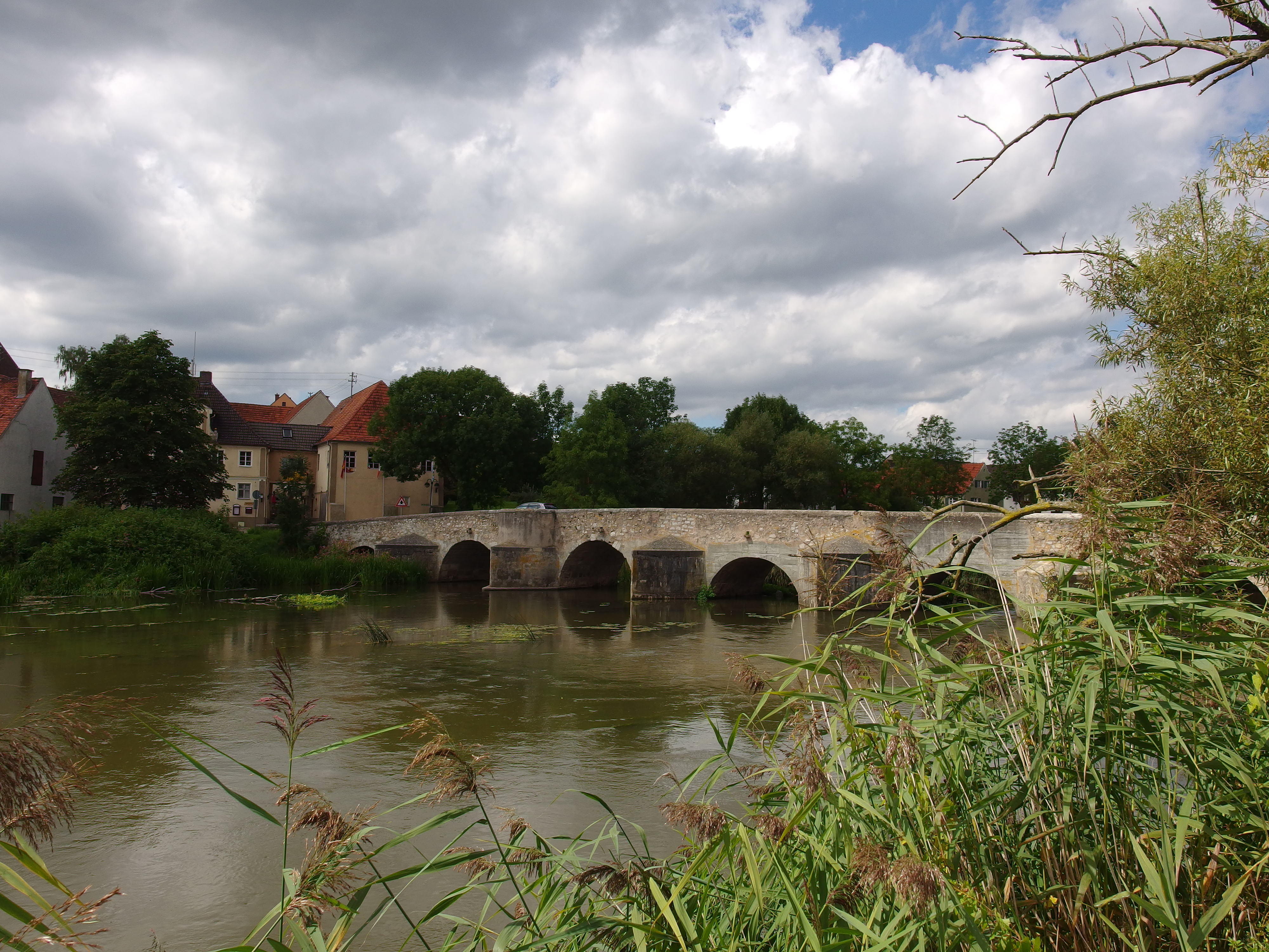 Ebermergen, Alte-Bücke, Gesamtansicht von SüdsüdostThis is a photograph of an architectural monument.